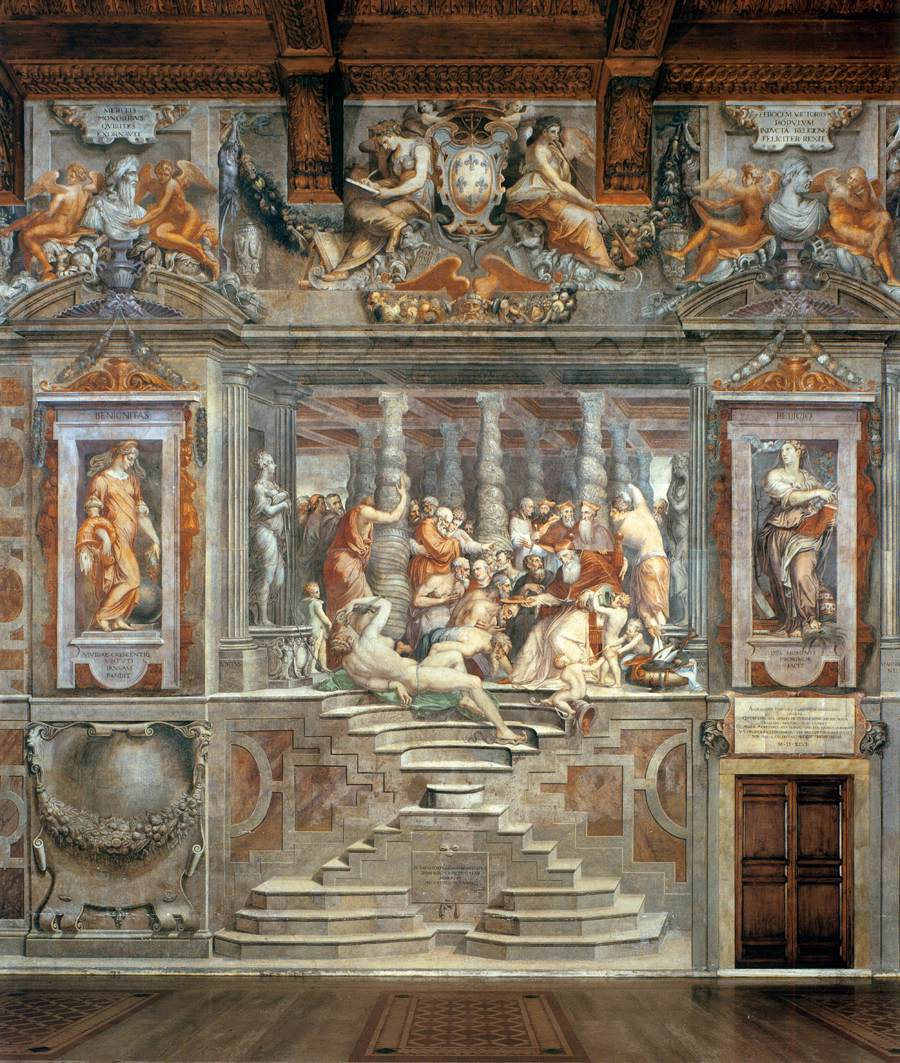 Paul III Farnese Names Cardinals and Distributes Benefices, Palazzo della Cancelleria, Rome